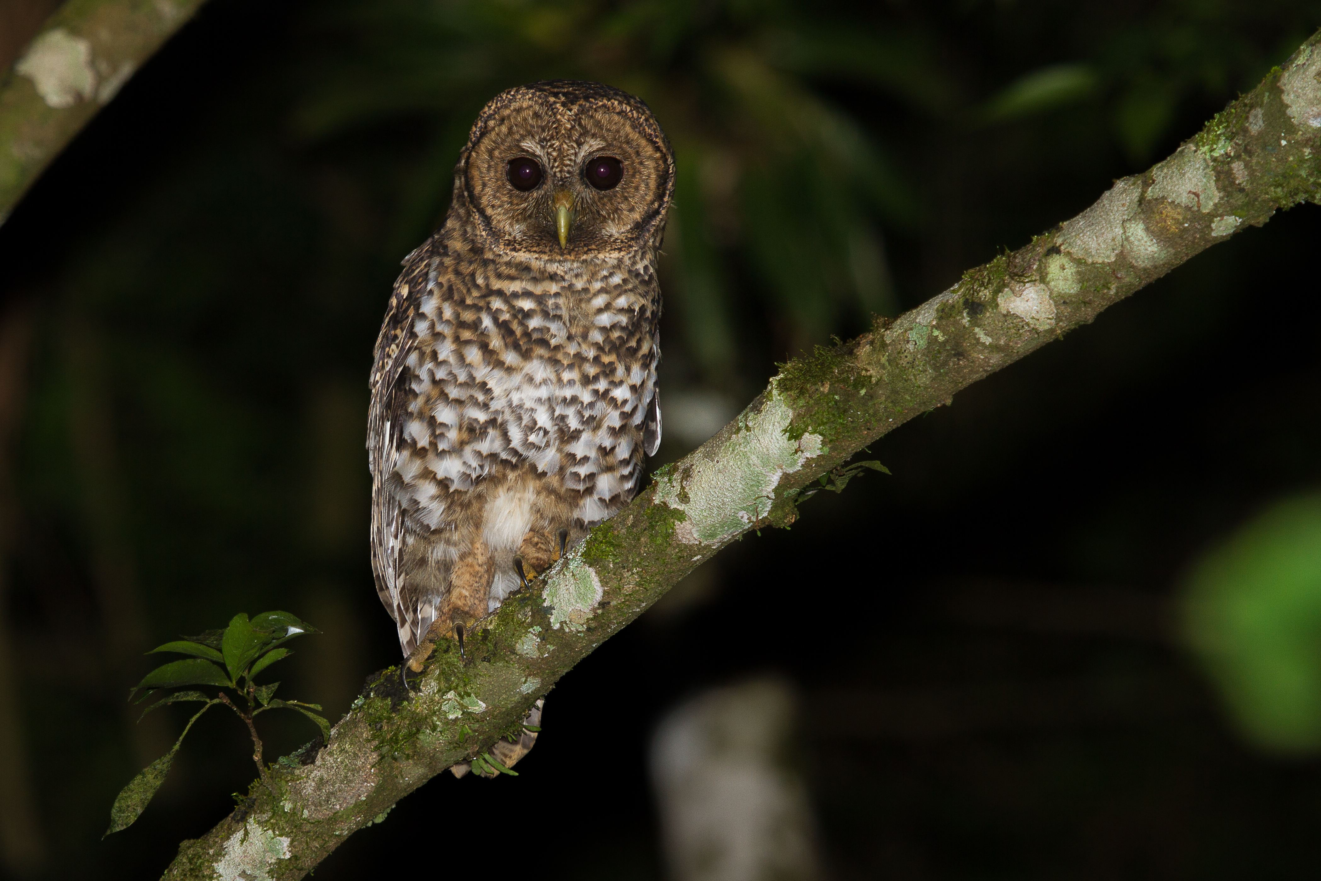 Coruja-listrada (Strix hylophila) no Parque Estadual Intervales